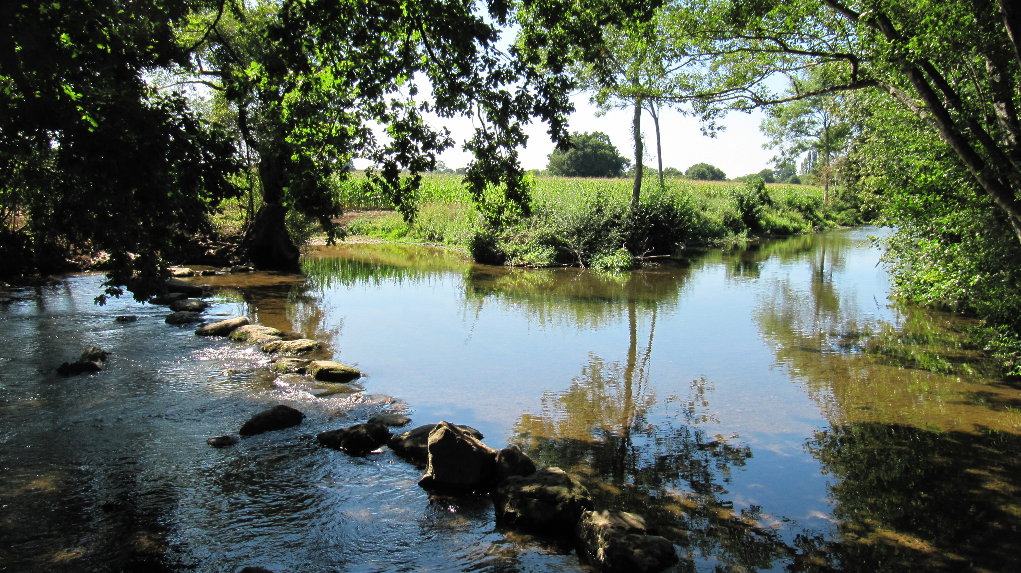 Les amateurs de pêche aiment l'endroit. Les randonneurs en canoé y font étape. Un chemin pédestre nouvellement créé longe la Vègre, passe sous la LGV et rejoint le village.